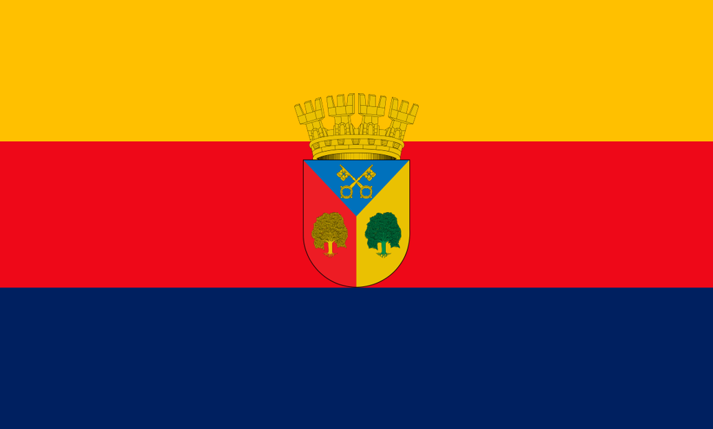 Bandera de la comuna de San Pedro, provincia de Melipilla (Chile)